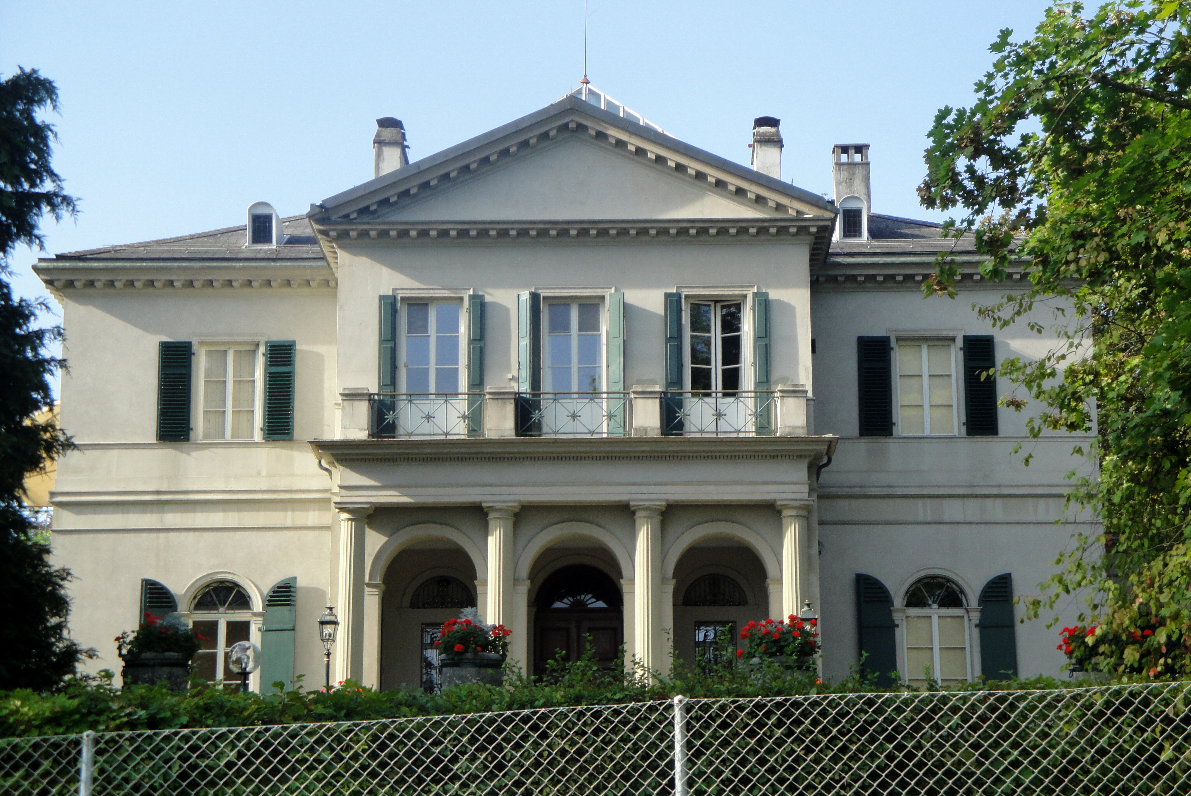 Bern, Villa Morillon. Von Johann Daniel Osterrieth (* 9. Oktober 1768 in Straßburg, Elsass; † 25. Juli 1839 in Bern) war ein Architekt des Klassizismus. Er war Berner Stadtbaumeister.